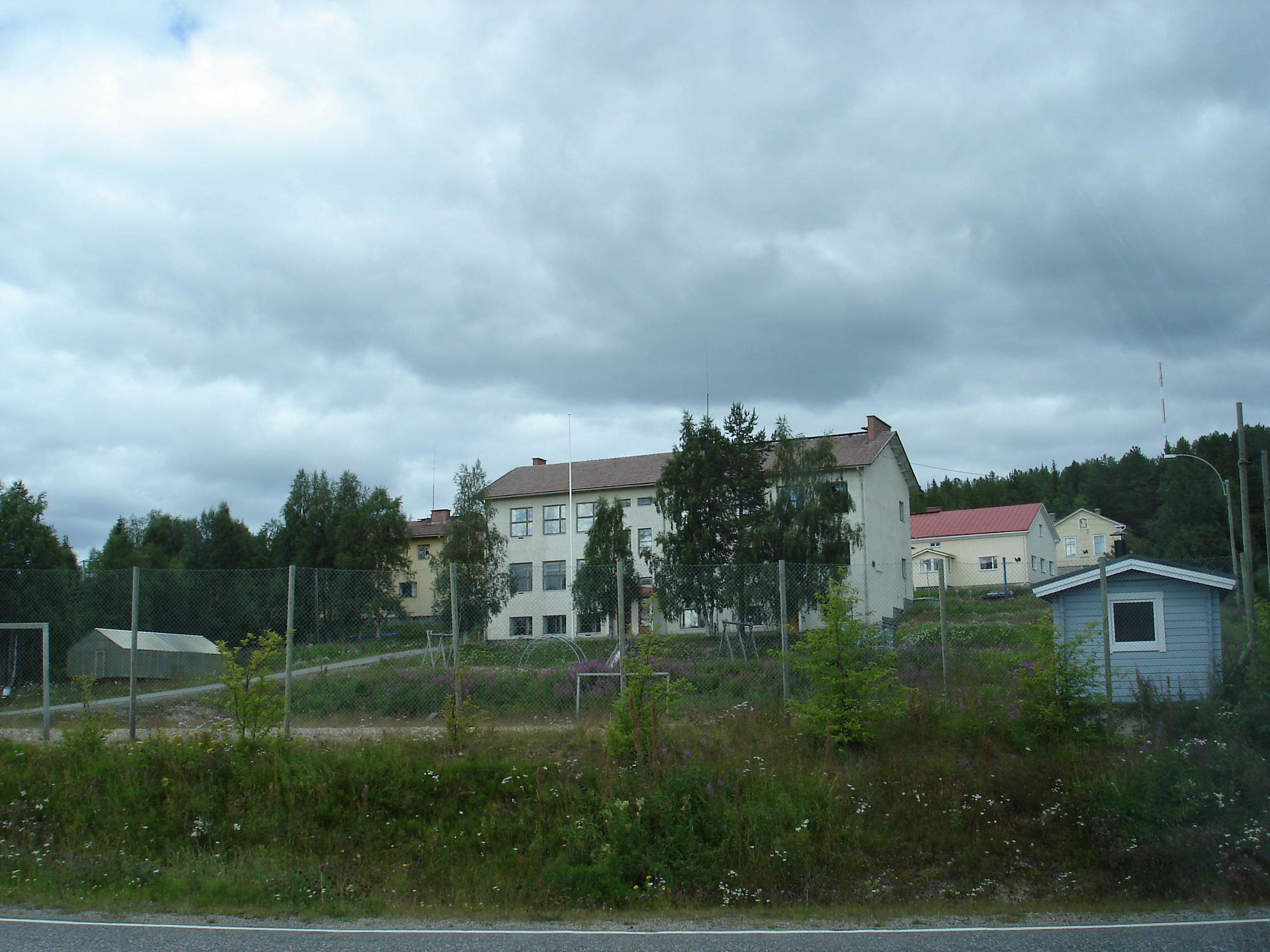 Ylimuonion kolme koulurakennusta neljästä. Etualalla kansakoulu- ja ala-asterakennus (rakennettu 1954), keskimmäisenä Muonion ensimmäinen koulurakennus, myöhemmin myös asuntola (1898), ylimpänä vanhakoulu. Ns. Lantonkoulu on noin 500 metrin päässä Muonioon päin kylätien varressa.